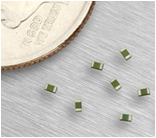 Ejemplo de termistor con encapsulado tipo chip SMD